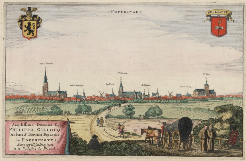 Poperinge in de eerste helft van de 17e eeuw (afbeelding uit Flandria Illustrata - 1641)